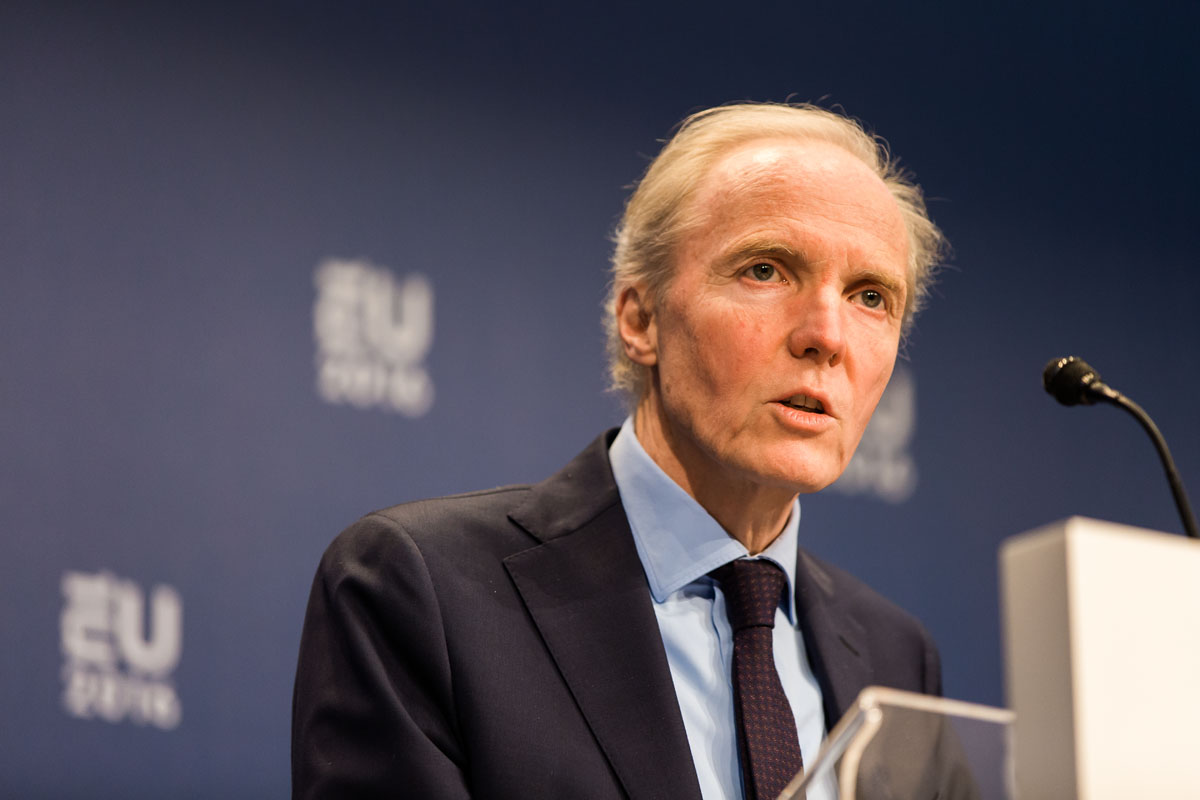 EU 2016,Amsterdam, 8 februari 2016. Conferentie van ministerie van Sociale Zaken en Werkgelegenheid SZW, "Promoting Decent Work" Op de foto : Michel servoz